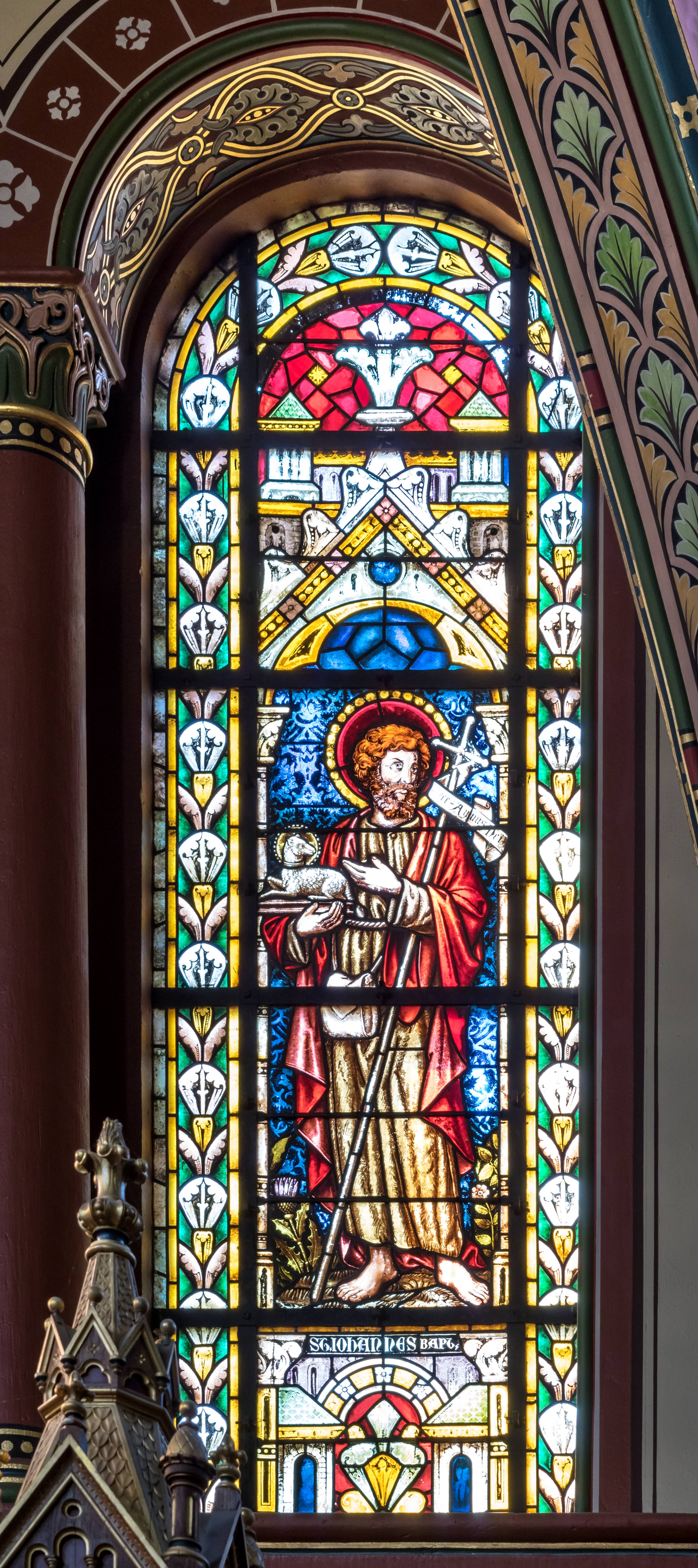 St. Peter und Paul in Bonndorf Die Glasfenster im Chor in der Kirche